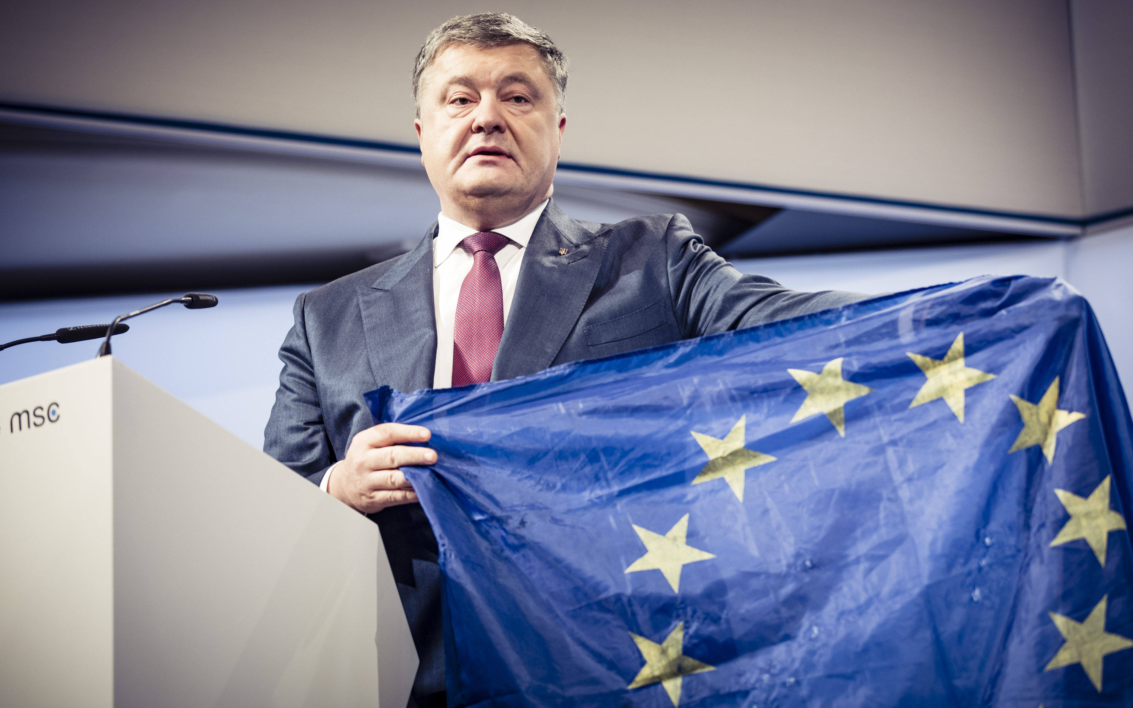 Der ukrainische Präsident Petro Poroschenko zeigt bei der Münchner Sicherheitskonferenz eine Europaflagge.